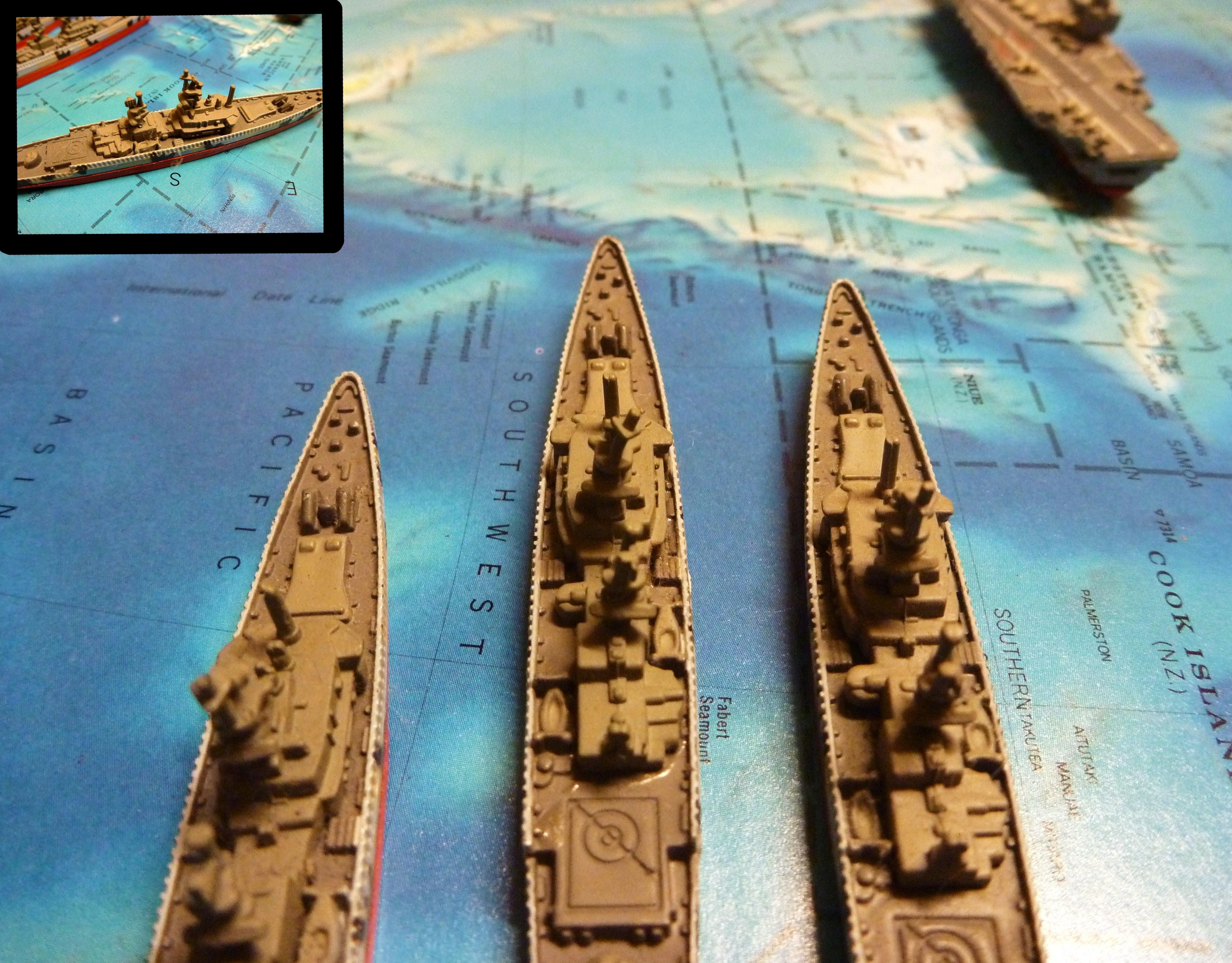 Illustration créée avec quelques bateaux et une carte d'un atlas destinée à illustrer une bataille maritime.